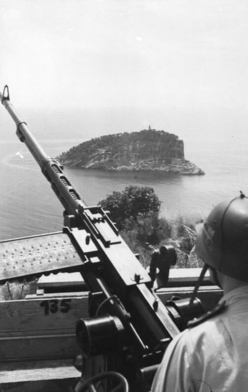 Information added by Wikimedia users.Isola del Tino, view from Isola Palmaria, Porto Venere, Liguria, 1944